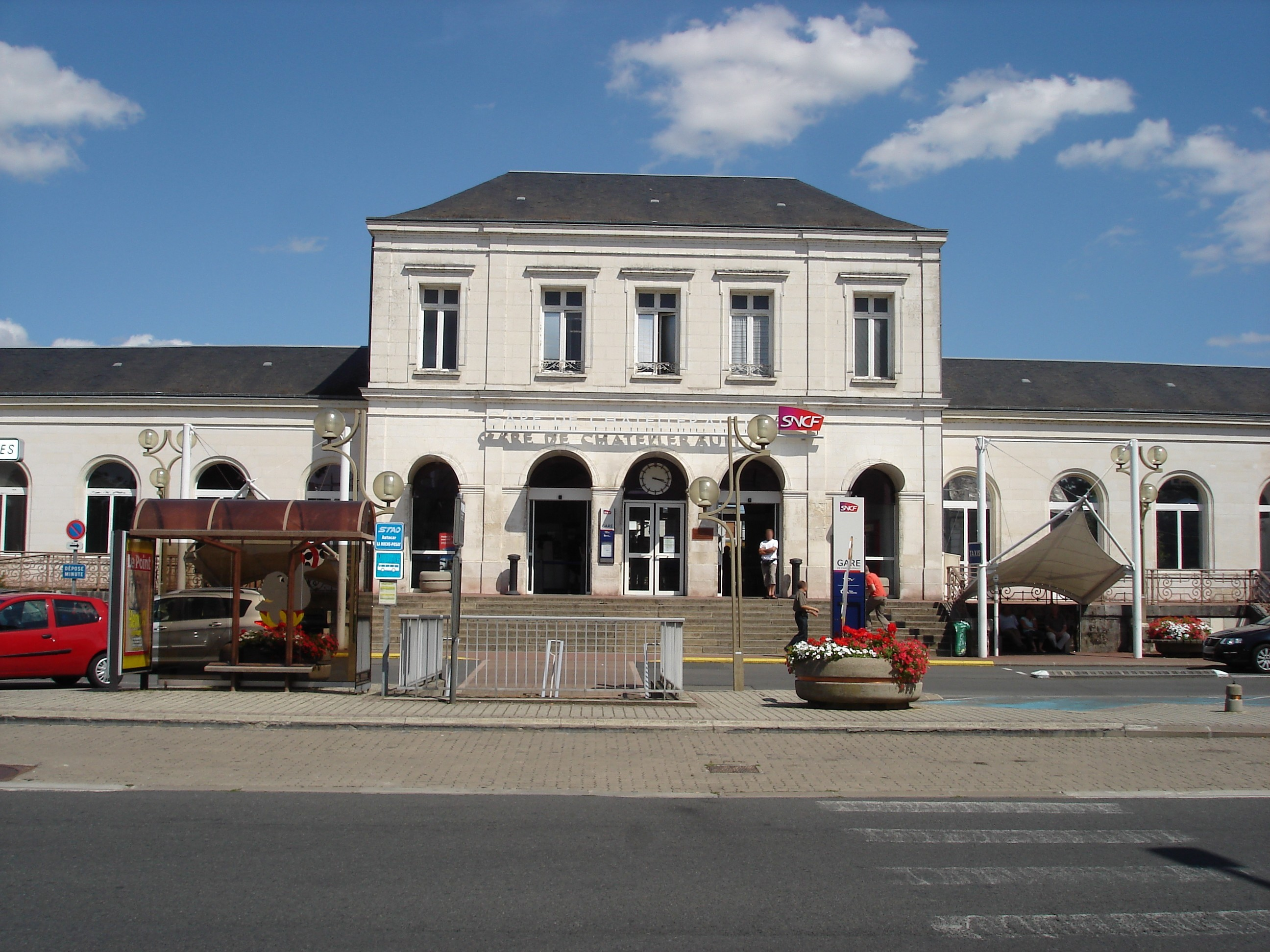 Gare de Châtellerault (86) : Le bâtiment voyageurs.